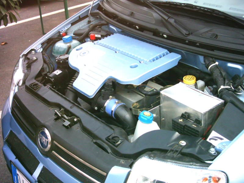 Prototipo Fiat Panda Hydrogen del 2006 fotografato all'Expo "AlternativaMente" di Medole nel 2007